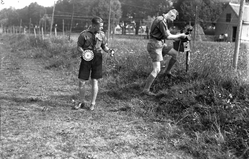 Hitlerjugend, Verlegen von Feldtelefonkabeln Hitlerjugend.- Wehrertüchtigung, Geländesportübungen und Verlegen von Feldtelefonkabeln.